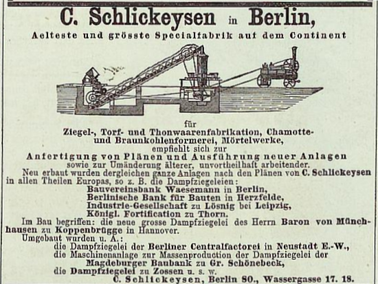 C. Schlickeysen in Berlin - Neu erbaute Anlagen (Kladderadatsch, Humoristisch-satirisches Wochenblatt, 30.1877)